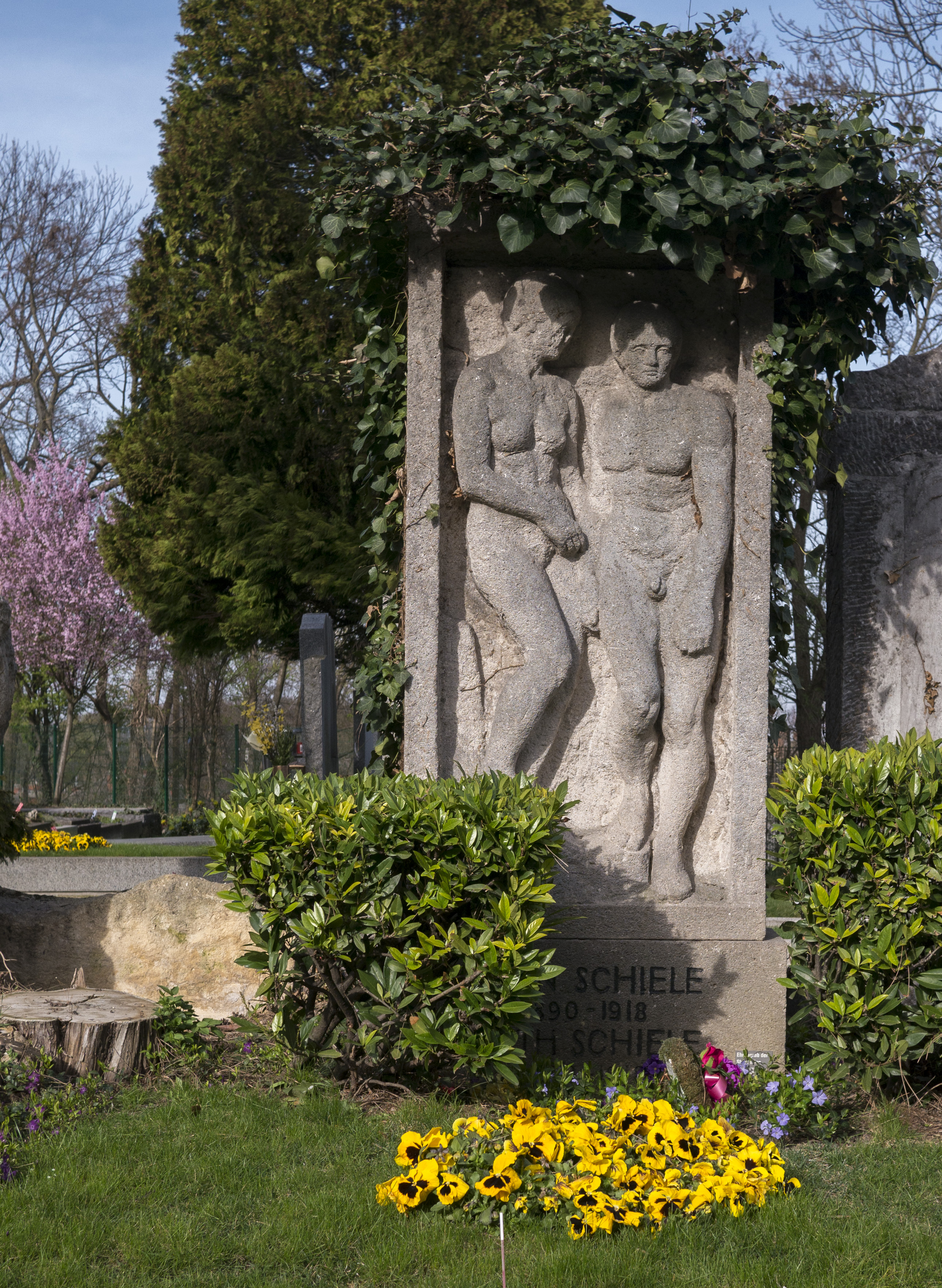 Ober Sankt Veiter Friedhof Schiele (Reihe 10, Grabgruppe B 15/6) in Wien XIII. , geschaffen vom ungarischen Bildhauer Benjamin Ferenczy (1890 bis 1967)